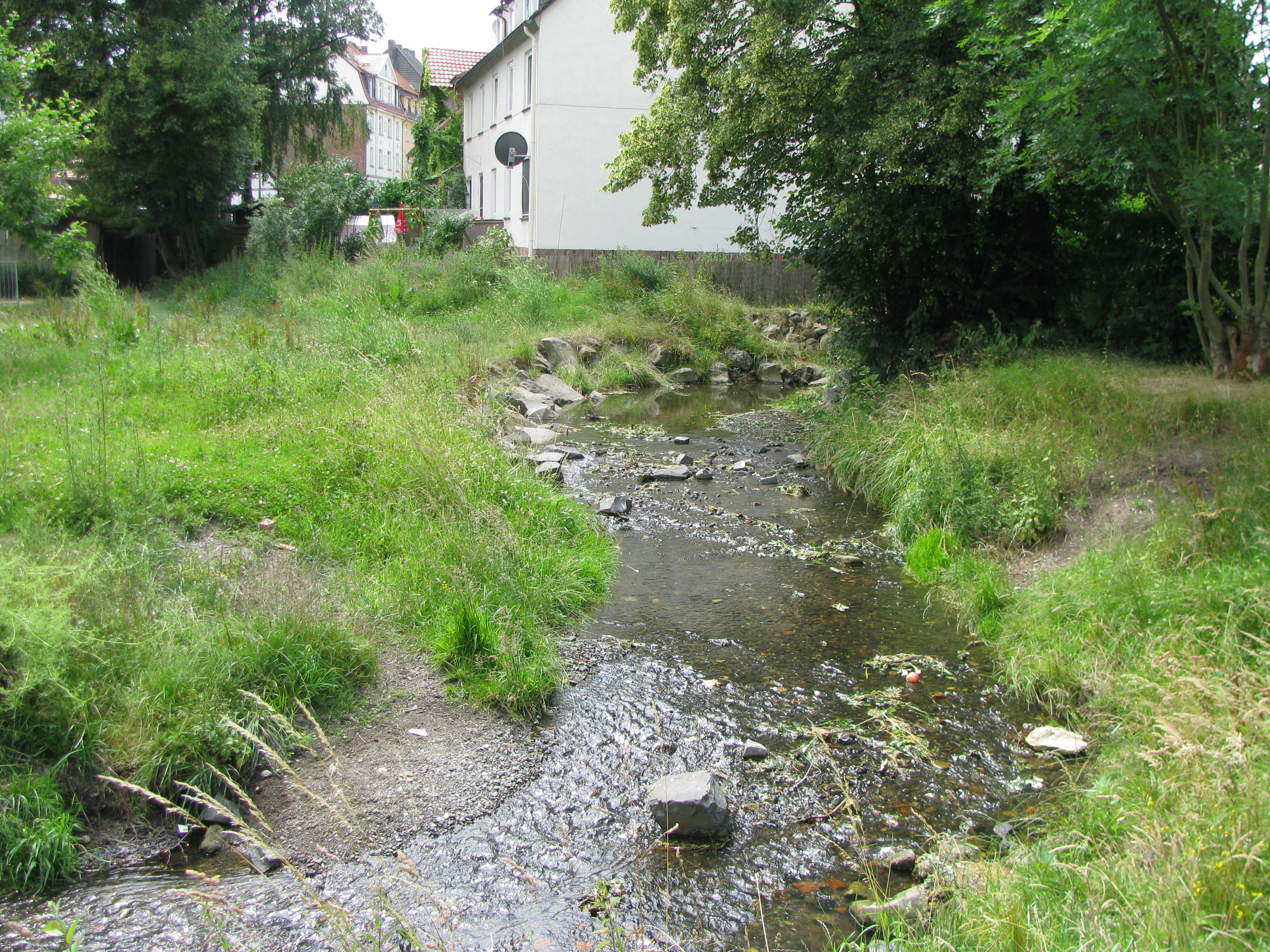 neugestalteter Verlauf der Drusel bei dem Weg Stockwiesen